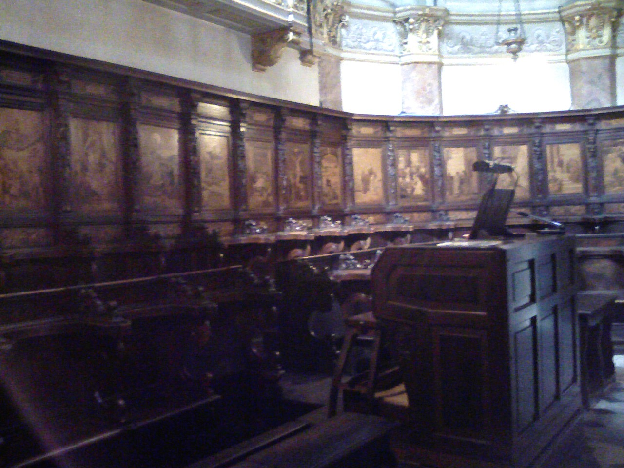 Coro intarsiato in legno del Santuario di savona (Italy)